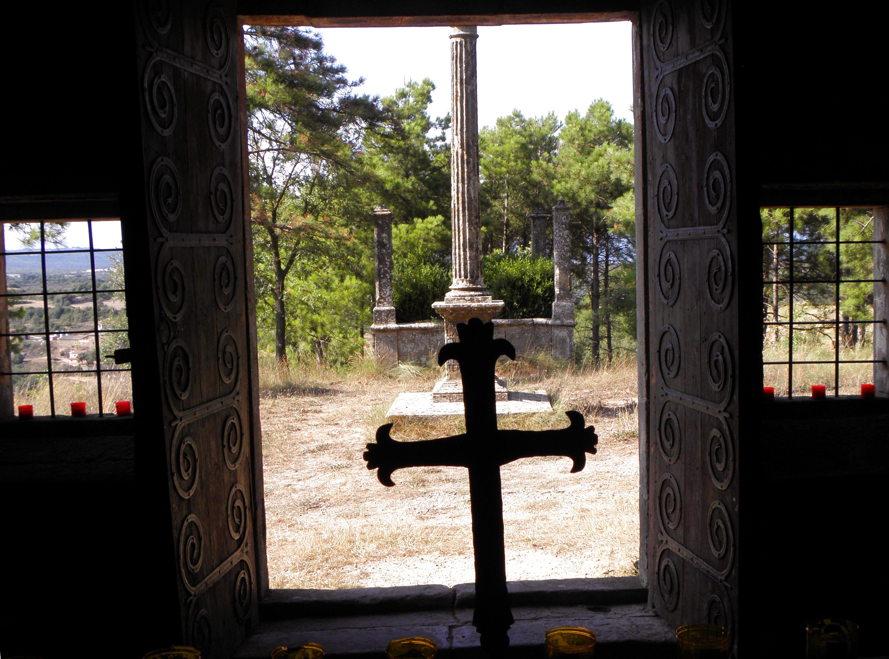 la creu i el clos de davant la capella de la Desaparició, al Santuari del Miracle (Riner, Solsonès), vistos des de darrera l'altar de la capella